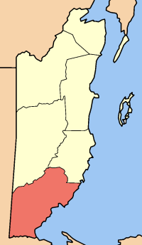 Toledo district, Belize